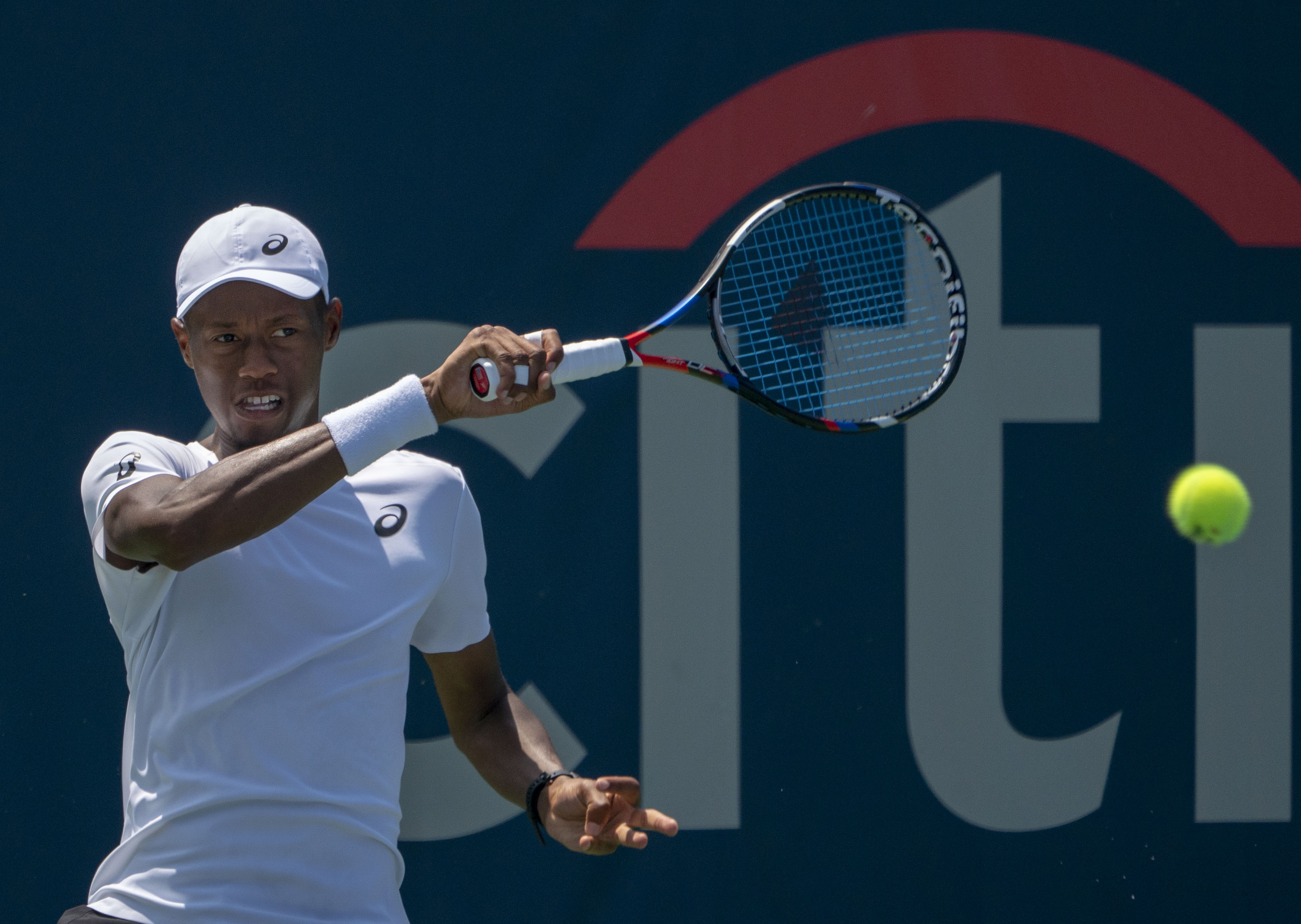 2018 Citi Open Tennis